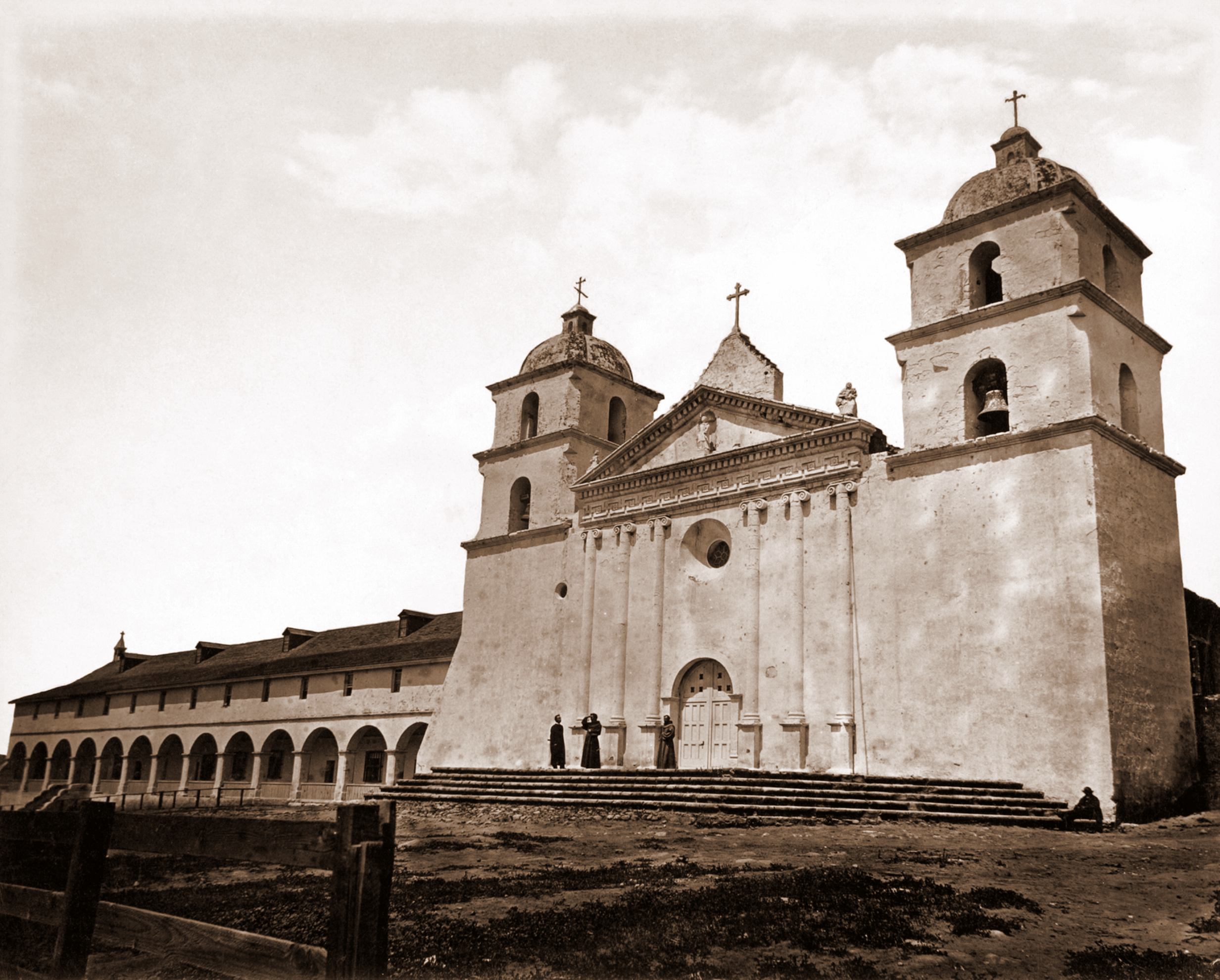 Old Mission Church, Santa Barbara; Albumen Silver Print